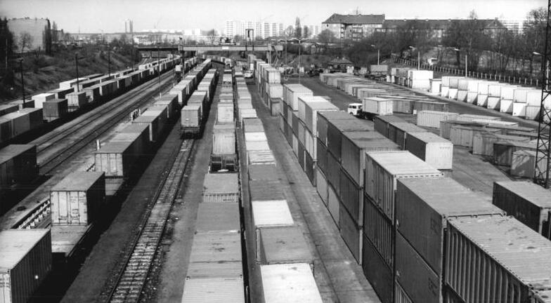 ADN-ZB-Sturm-19.10.76-eng-Berlin: Rund 200 000 "silberne Kisten" werden jährlich im Versand und Empfang auf dem Berliner Containerbahnhof Frankfurter Allee abgefertigt. Von Berlin aus bestehen mit 13 Umschlagplätzen in allen Teilen der DDR Direktverbindungen. Durch die immer engere werdende Integration und Kooperation der DDR mit der UdSSR und den anderen sozialistischen Ländern erhöht sich ständig die Umschlagleistung der hier beschäftigten Arbeiter. Allein bis 1980 steige der Warenaustausch der DDR mit der Sowjetunion um 40 Prozent."